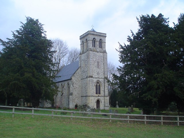 All Saints church, Dogmersfield